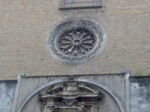 Chieti - Il rosone della chiesa di San Francesco.